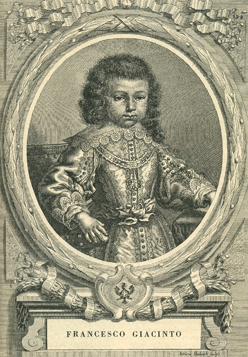 Francesco Giacinto di Savoia (1632–1638)